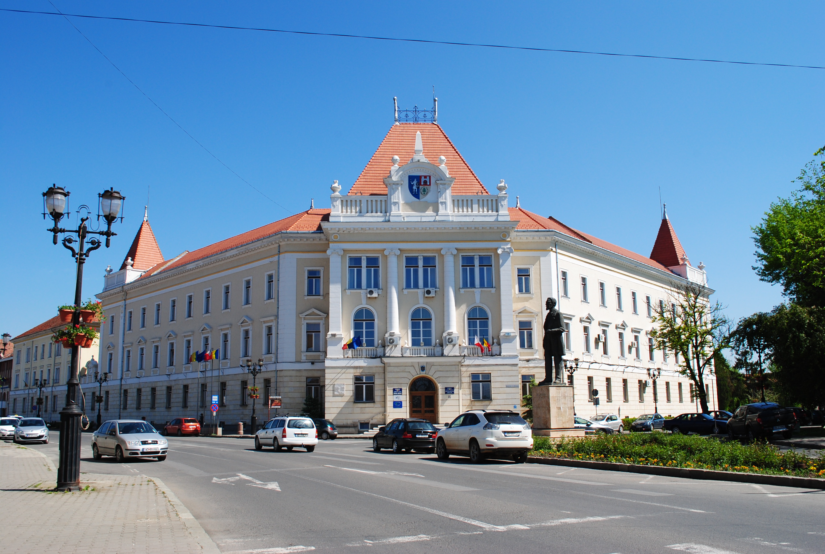 Sediul actual al Prefecturii, sec. XIX-XX